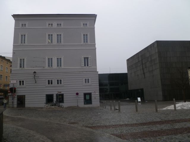 Paris-Lodronscher_Primogeniturpalast_-_Seitenansicht